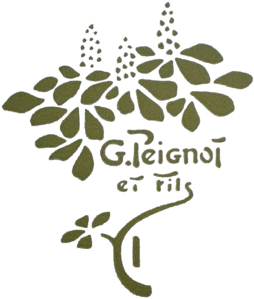 Logo de la fonderie de caractères typographiques G. Peignot et fils